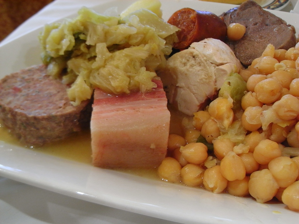 Detalle del Codido Madrileño del Restaurante Albahaca